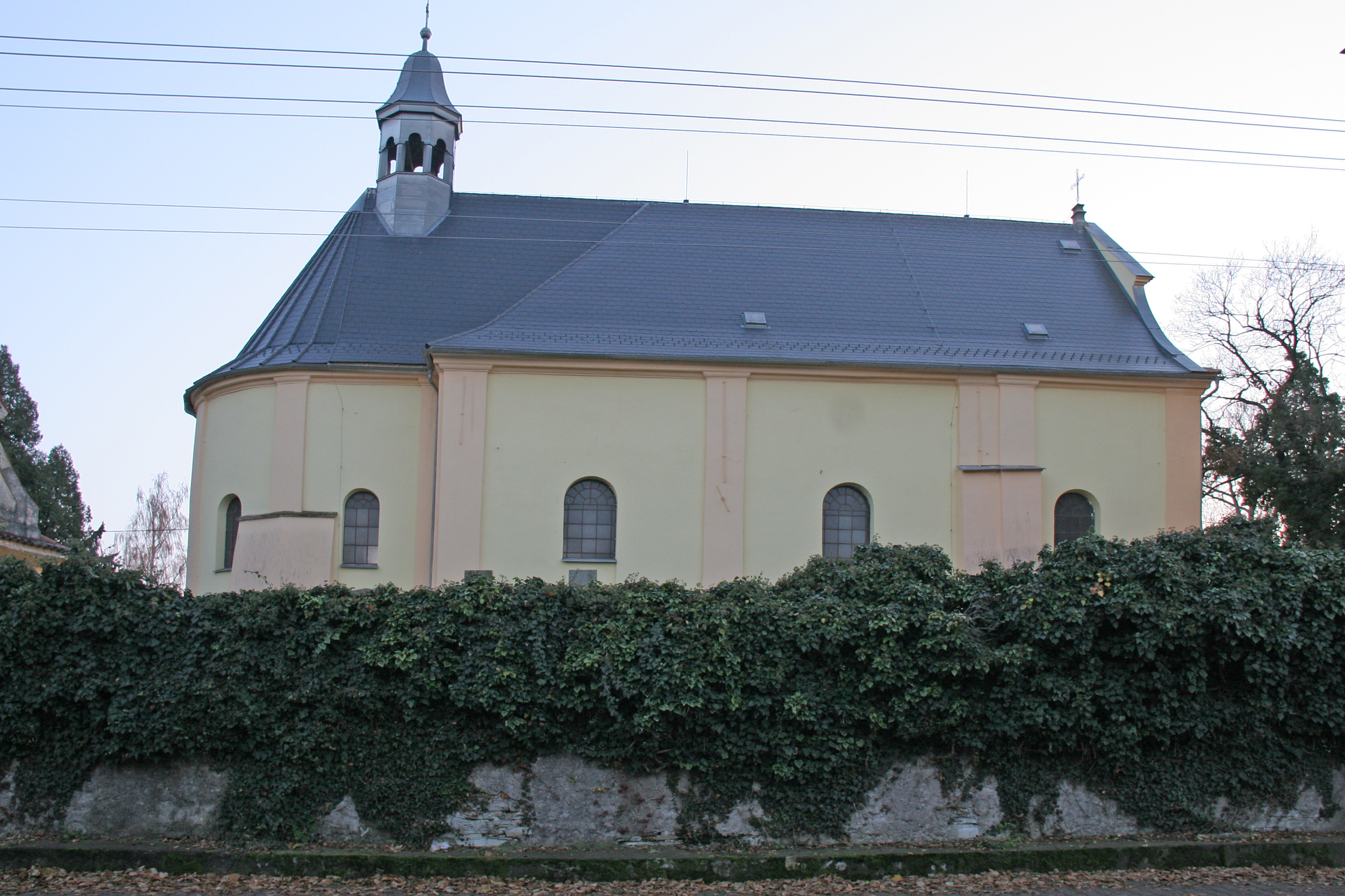 Kostel sv. Kateřiny (Horní Roveň), střed obce, Horní Roveň